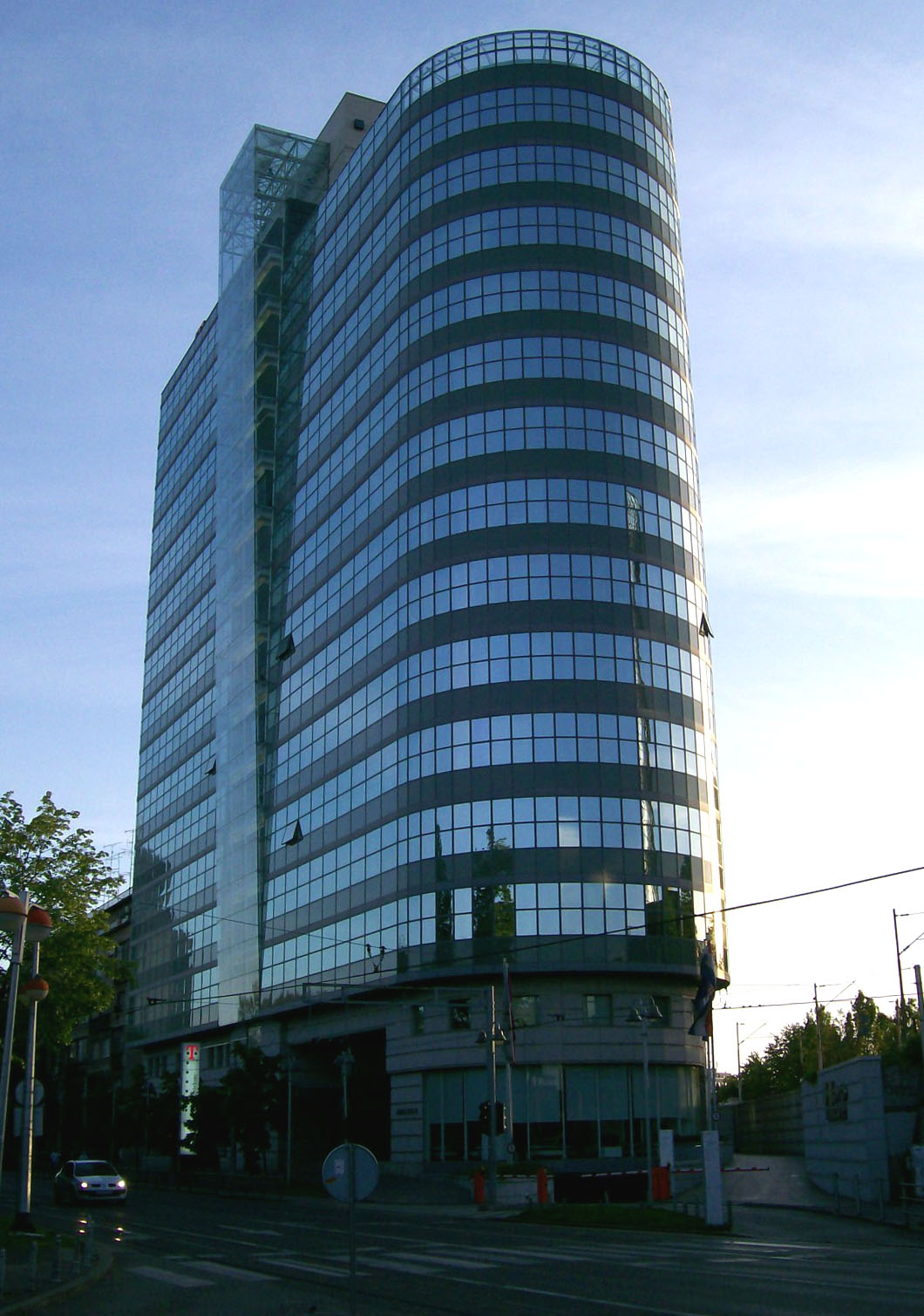 HOTO toranj Savska cesta, Zagreb